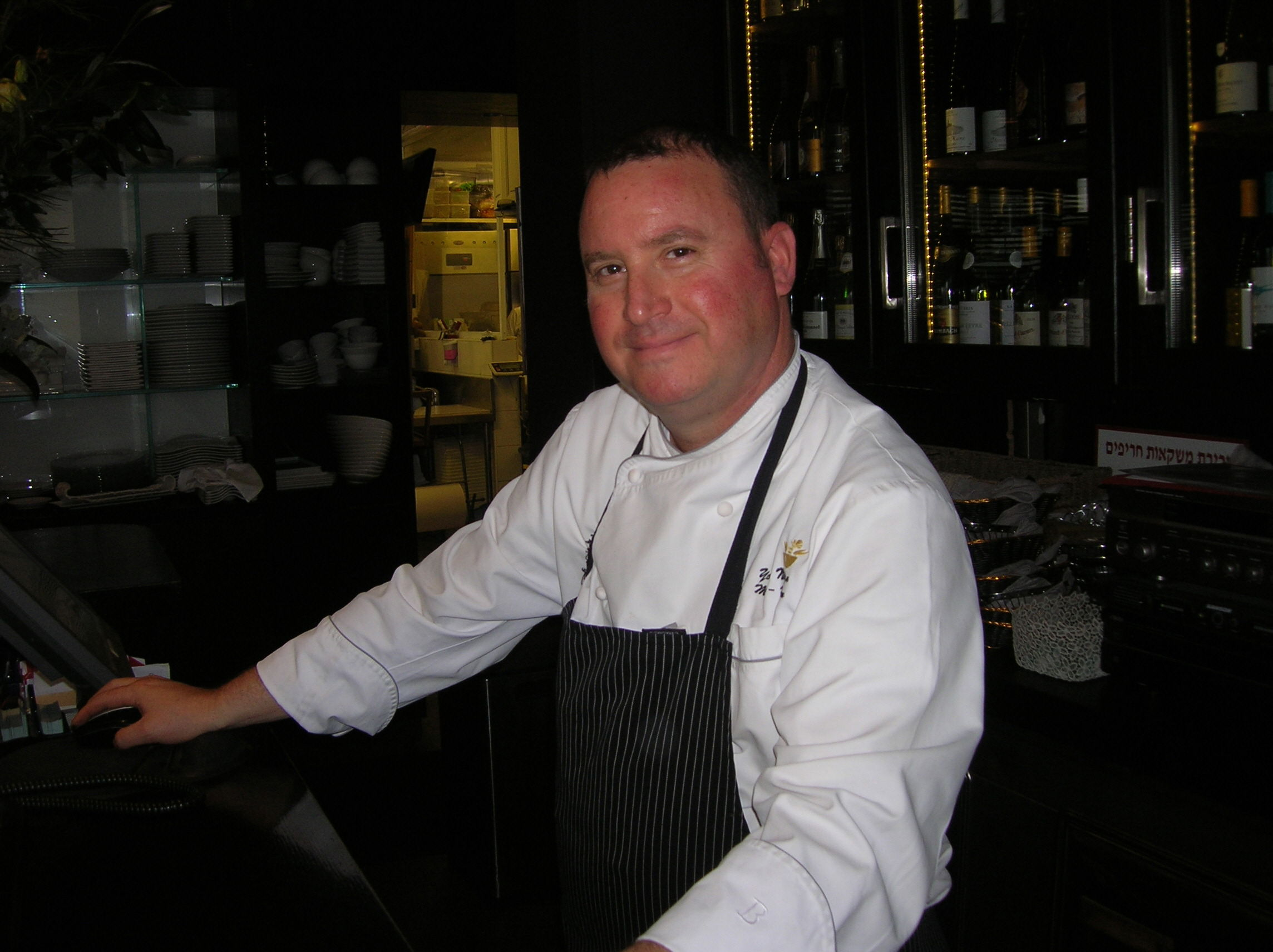 יורם ניצן, שף מסעדת מול ים